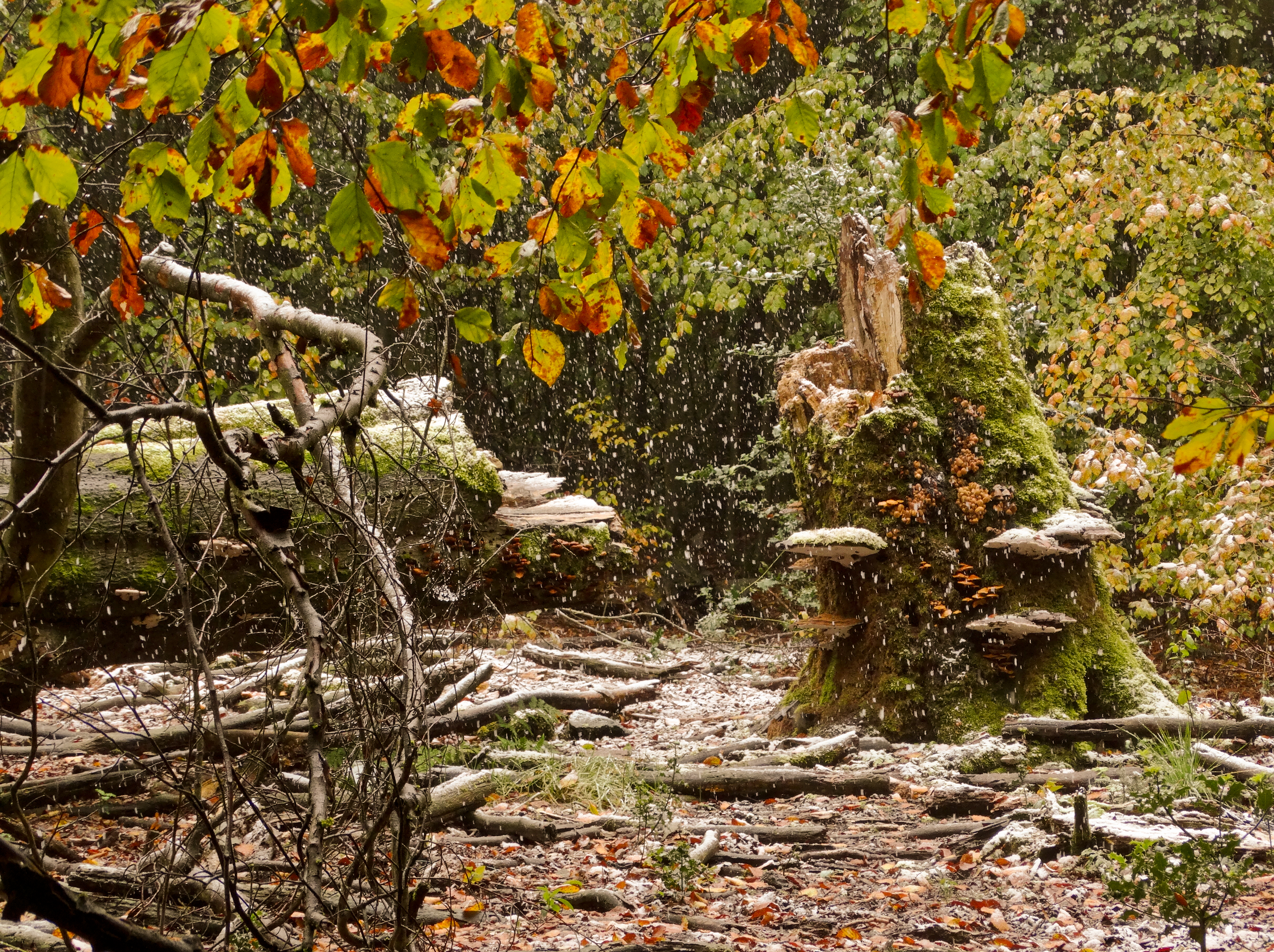 Gefallene Buche im Scharpenacker Wald